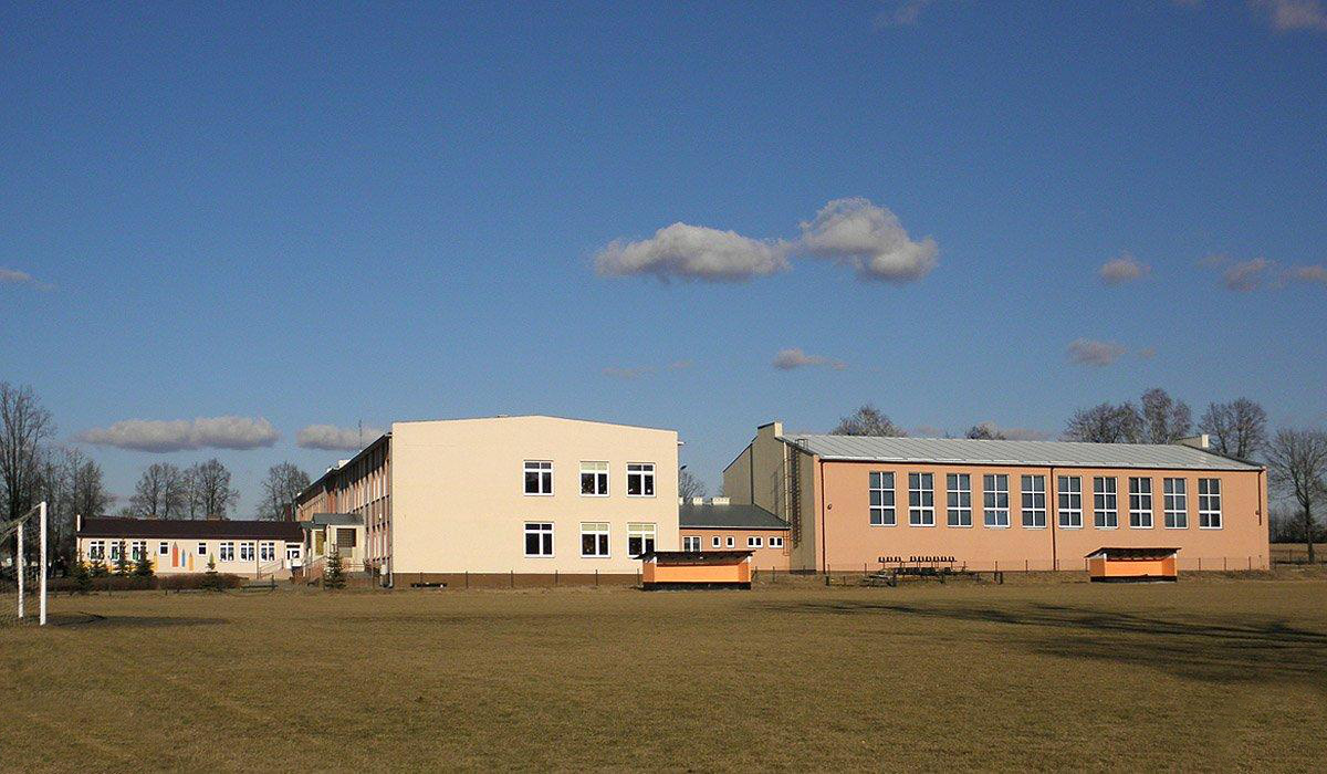 Zespół szkolno-przedszkolny w Jastrzębi.